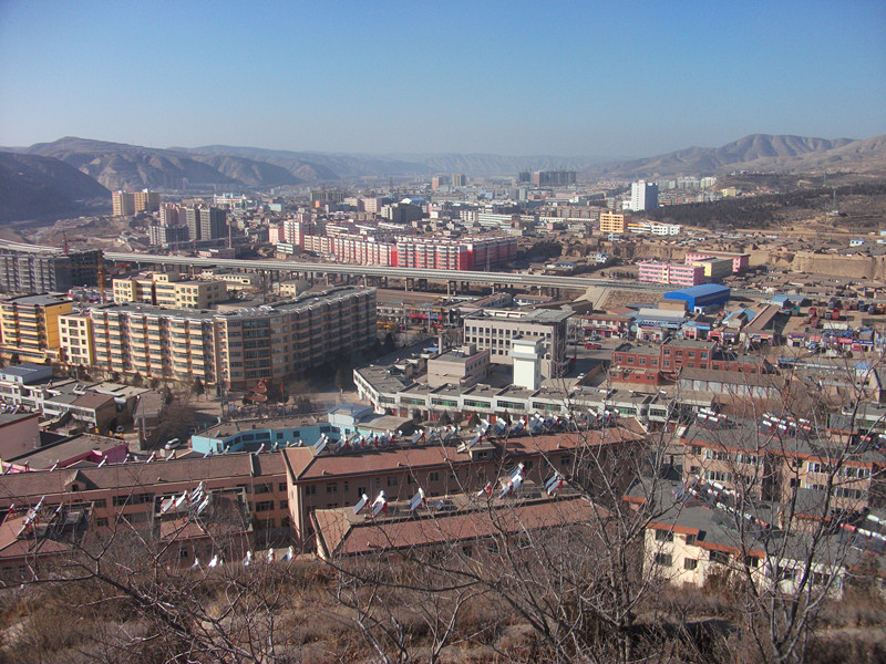 Huining, Baiyin, Gansu, China